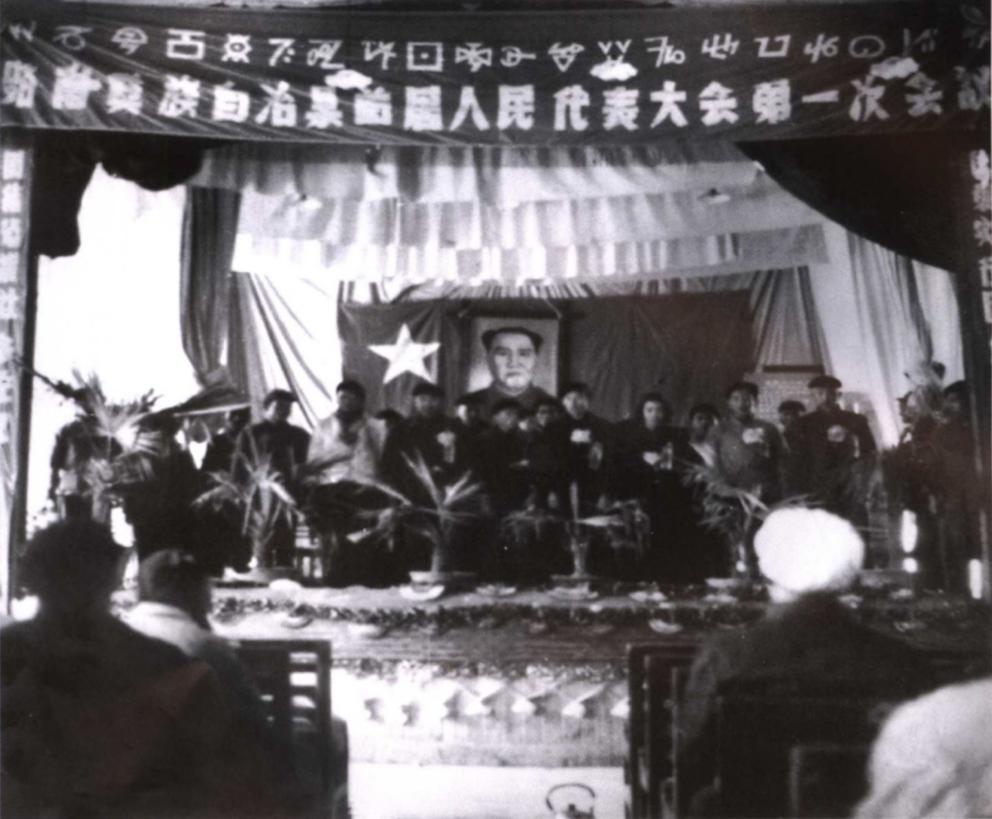 中文（中国大陆）: 1956年路南彝族自治县人民代表大会第一次会议